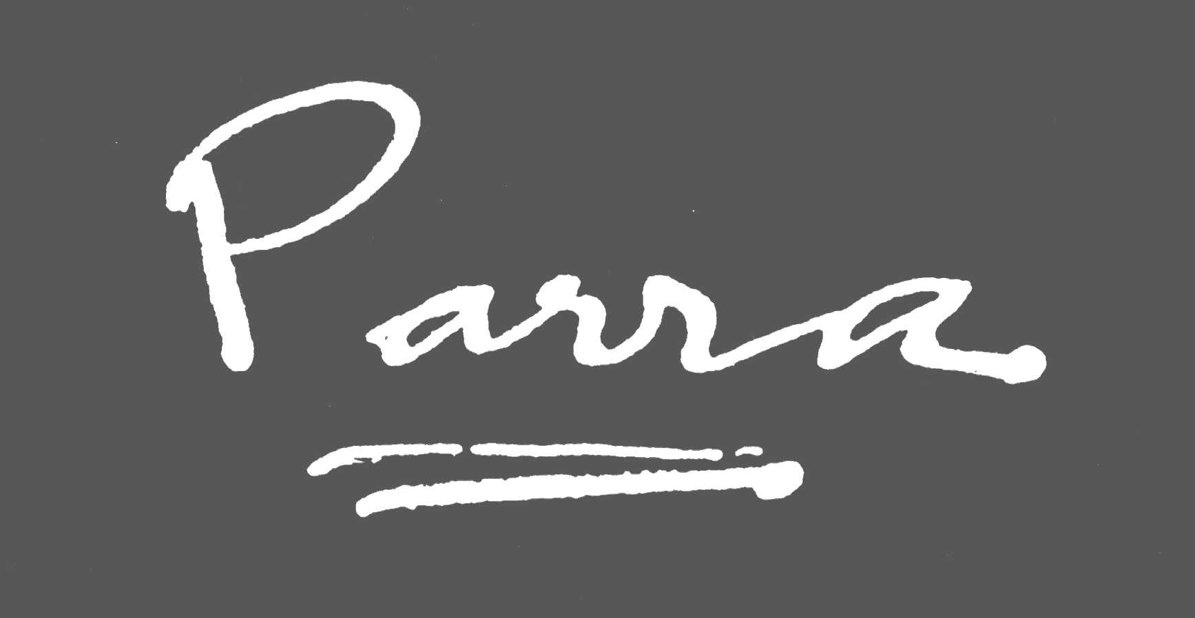 Signature du peintre Ginés Parra